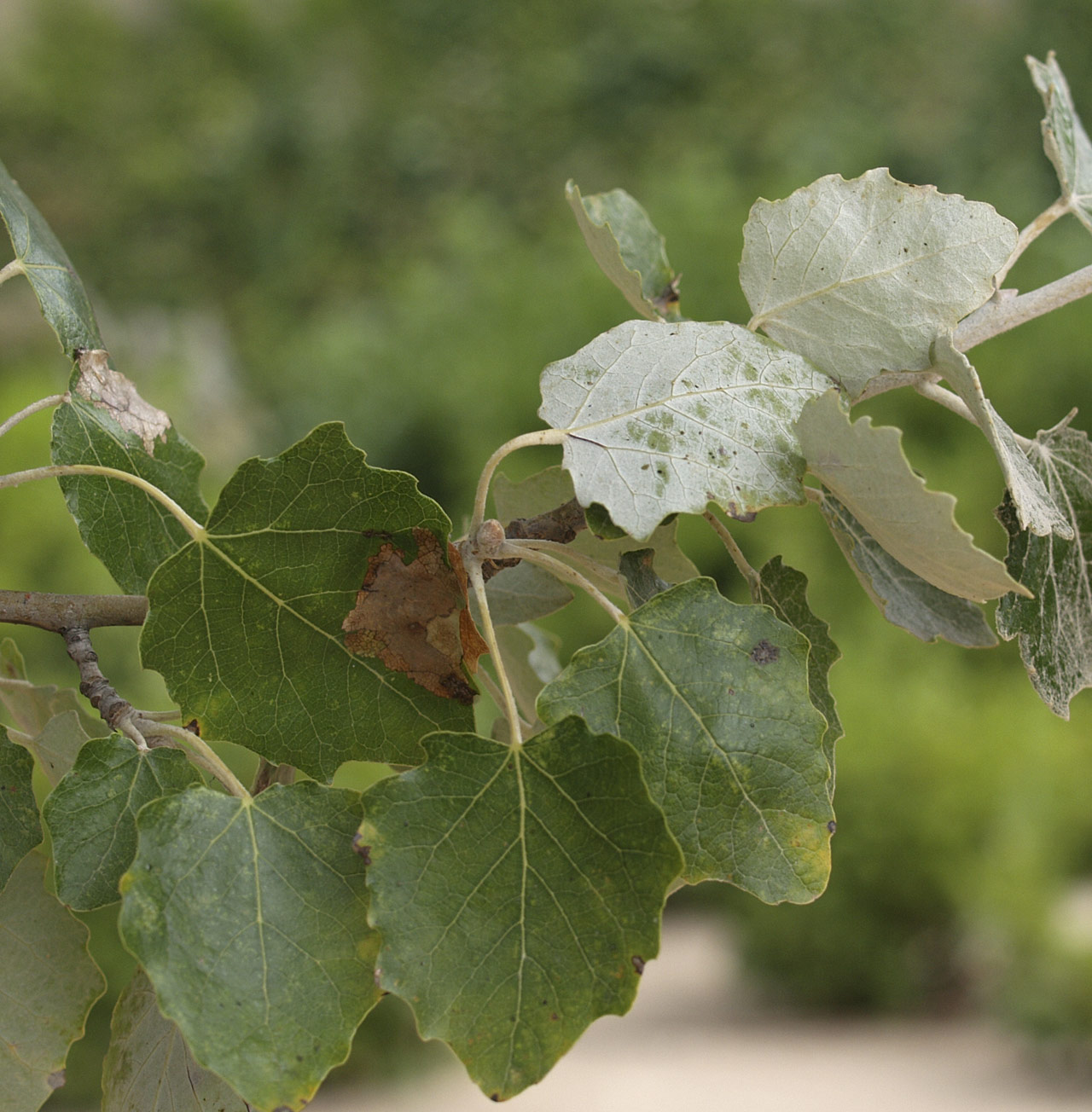 Populus sp. (seguramente P. alba), hojas mostrando la diferencia de aspecto del haz y el envés. Parque del Oeste, Madrid.